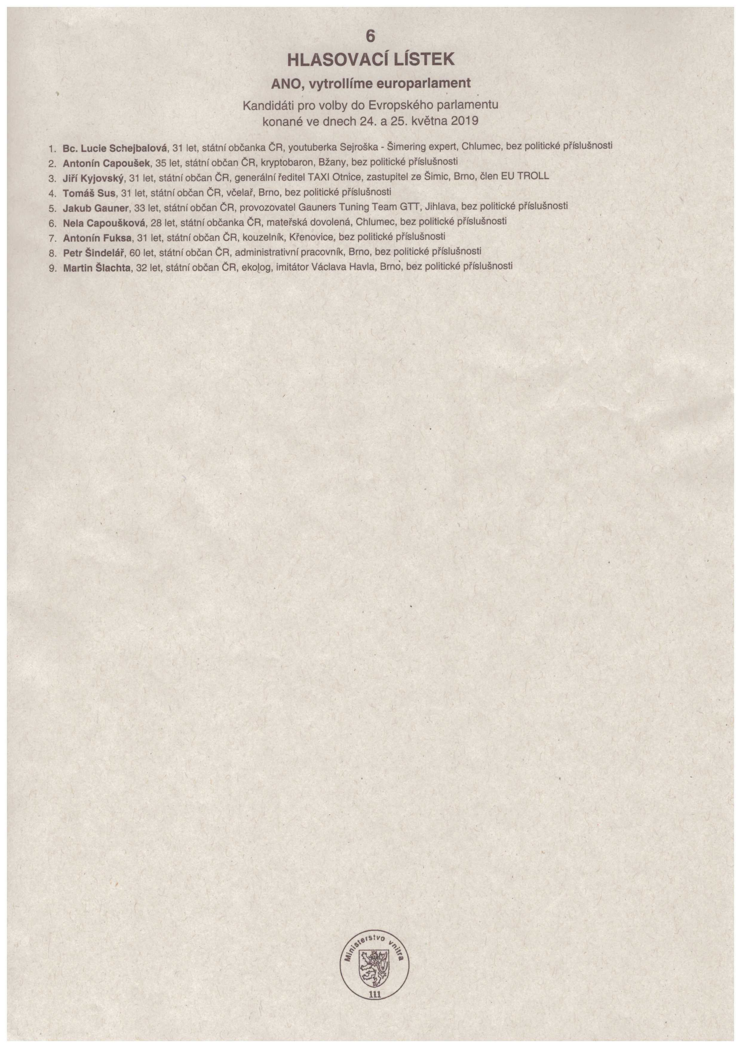 Volební lístek hnutí „ANO, vytrollíme europarlament“ pro volby do Evropského parlamentu v roce 2019.